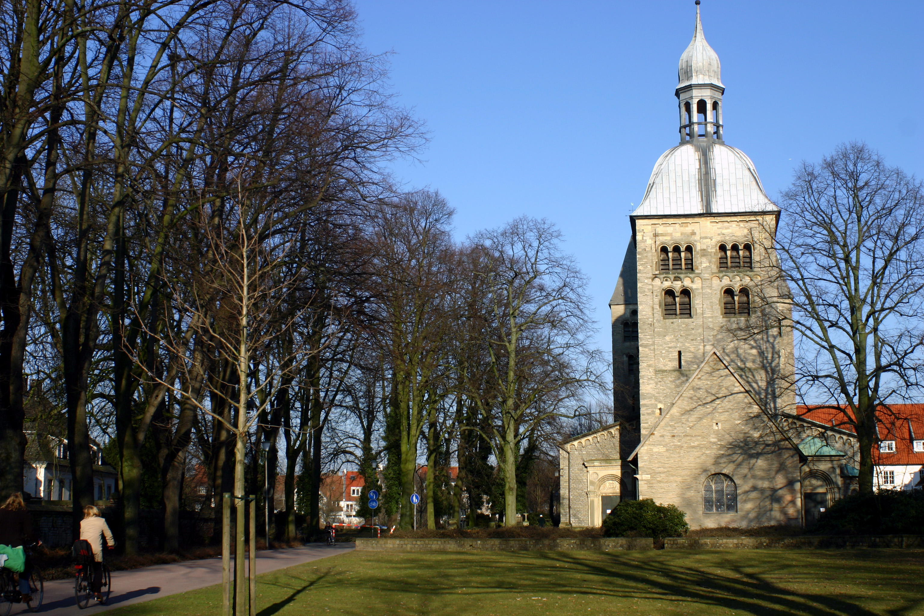 die St. Mauritz Kirche vom Hohenzollernring aus gesehen